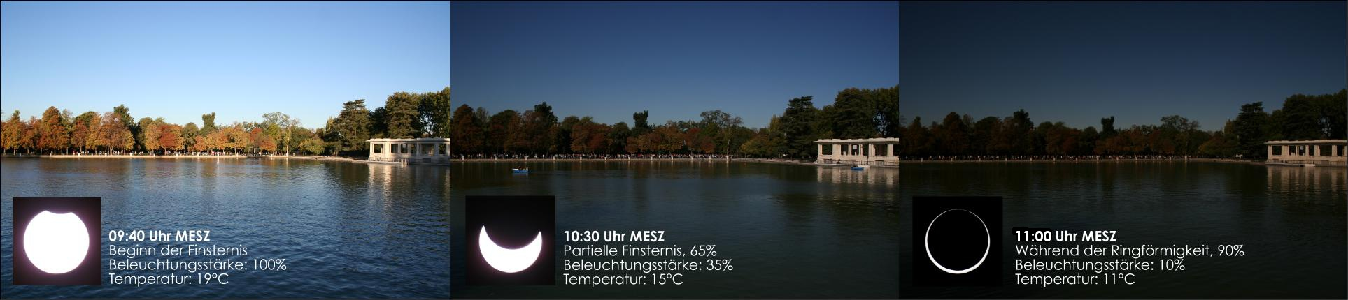 Diese drei Bilder entstanden während der ringförmigen Sonnenfinsternis am 3. Oktober 2005 in Madrid. Sie zeigen deutlich, wie sich die Beleuchtung der Landschaft verändert. Publiziert in der Fachzeitschrift ORION der Schweizerischen Astronomischen Gesellschaft SAG